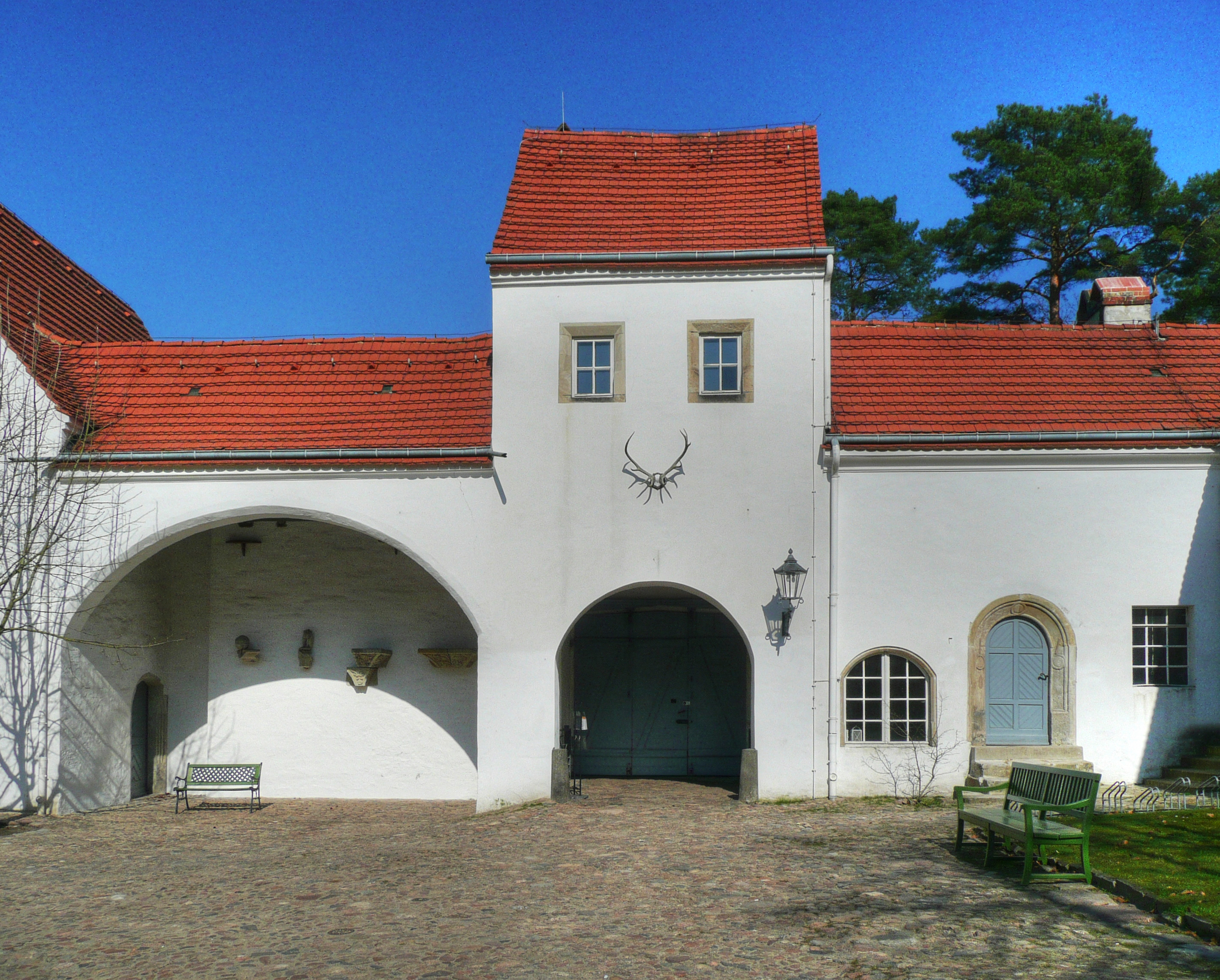 Torbau an der Ostseite des Jagdschlosses (vom Hof aus gesehen)